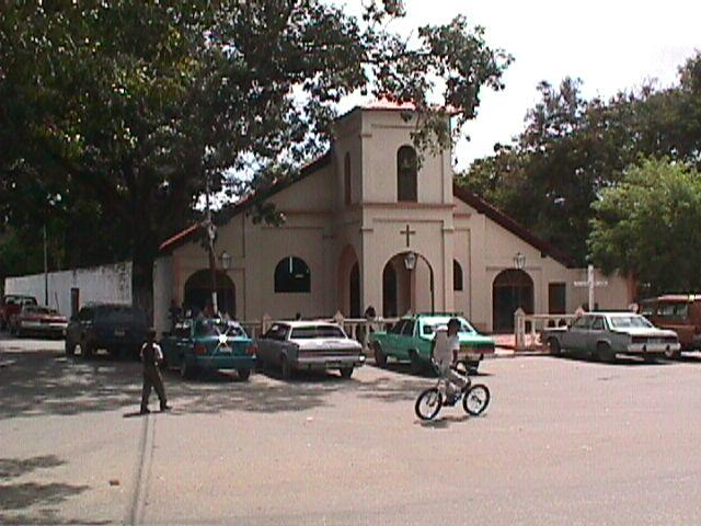 Yagua church in Carabobo, Venezuela